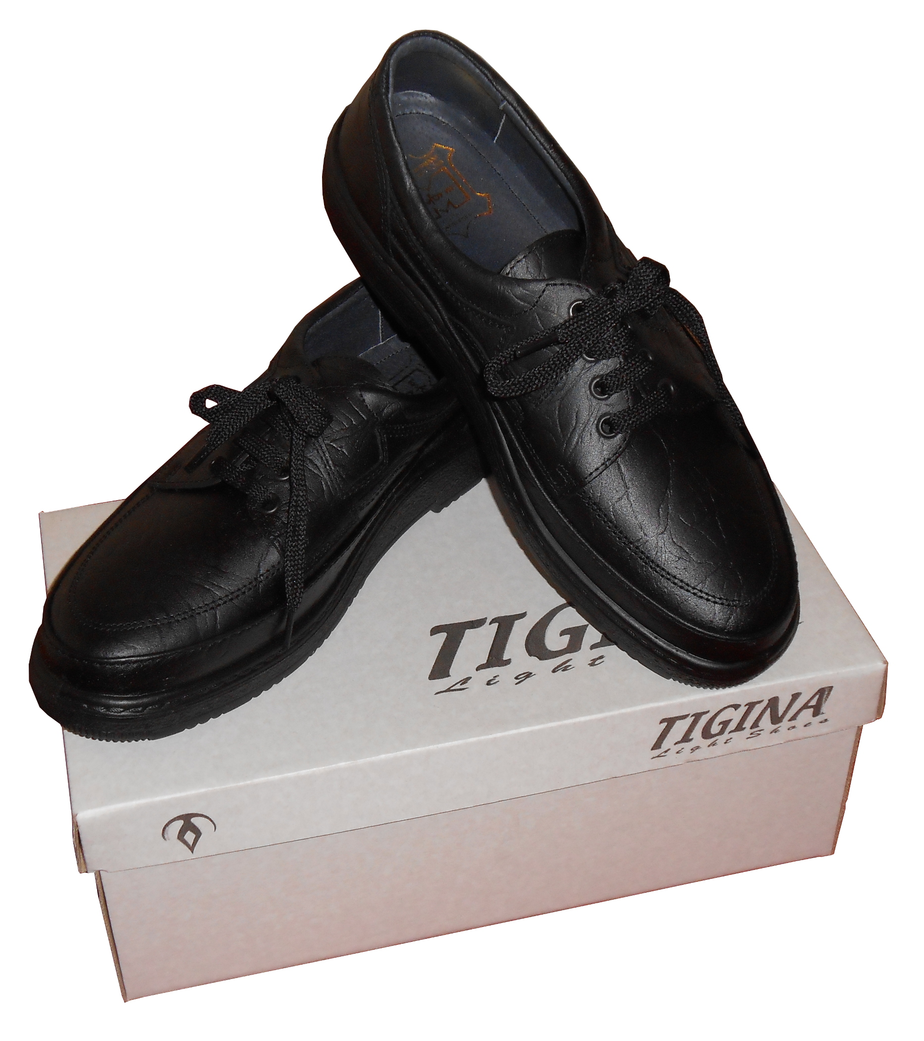 Туфли Бендерского завода Тигина Taken with Nikon Coolpix S2700